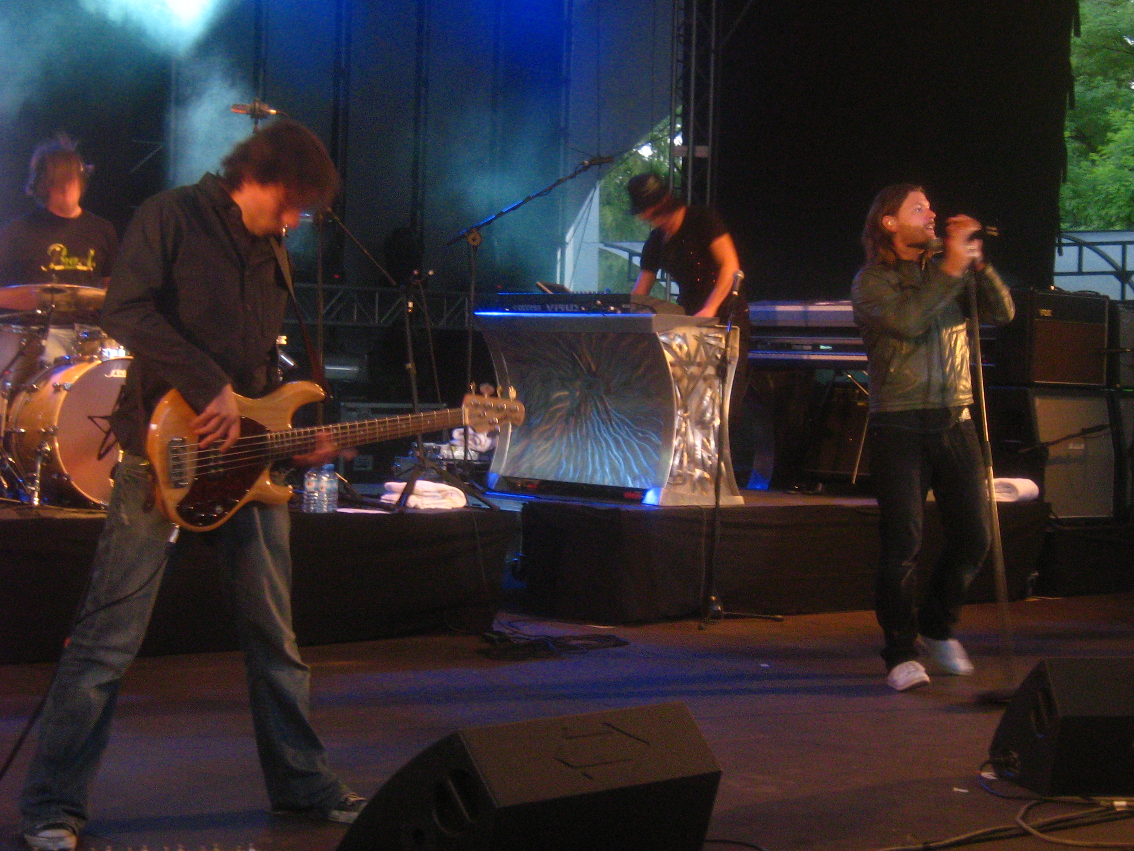 Zespół Reamonn podczas koncertu w Teatrze Letnim w Szczecinie. 5 lipca 2008.